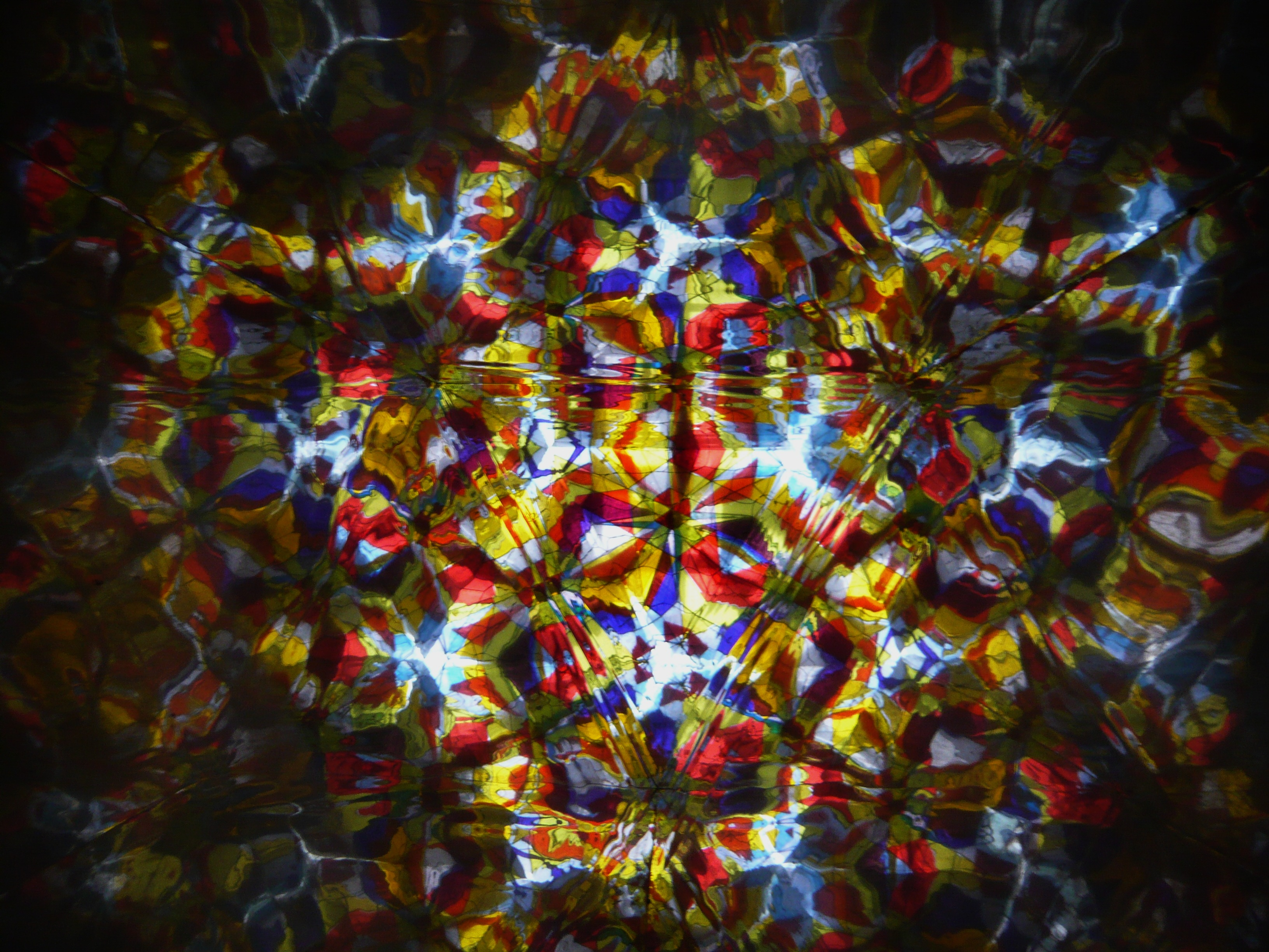 Gifu Pref Centennial Park 岐阜県百年公園 巨大w:ja:万華鏡内部（岐阜県百年公園）,Seki,Gifu,Japan（岐阜県関市）で撮影。